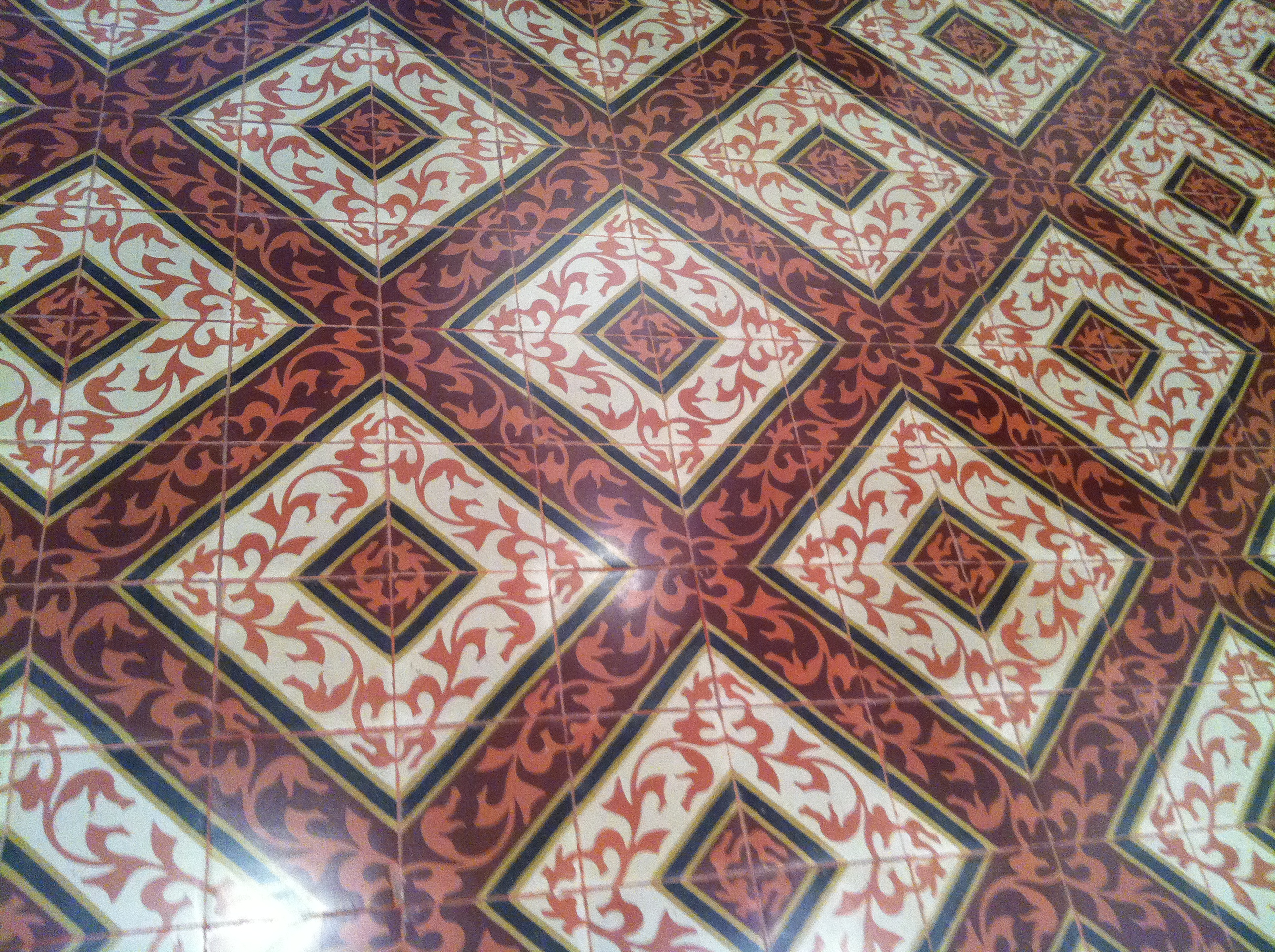 Ca l'Arenas.Centre d'Art del Museu de Mataró